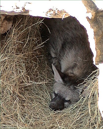 Proteles cristatus